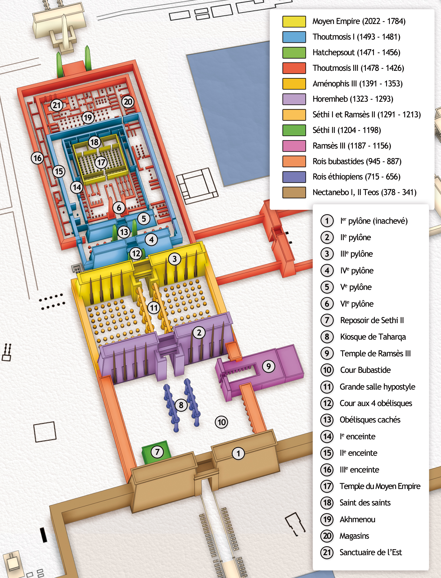 Plan du temple d'Amon avec distinction des étapes de sa construction